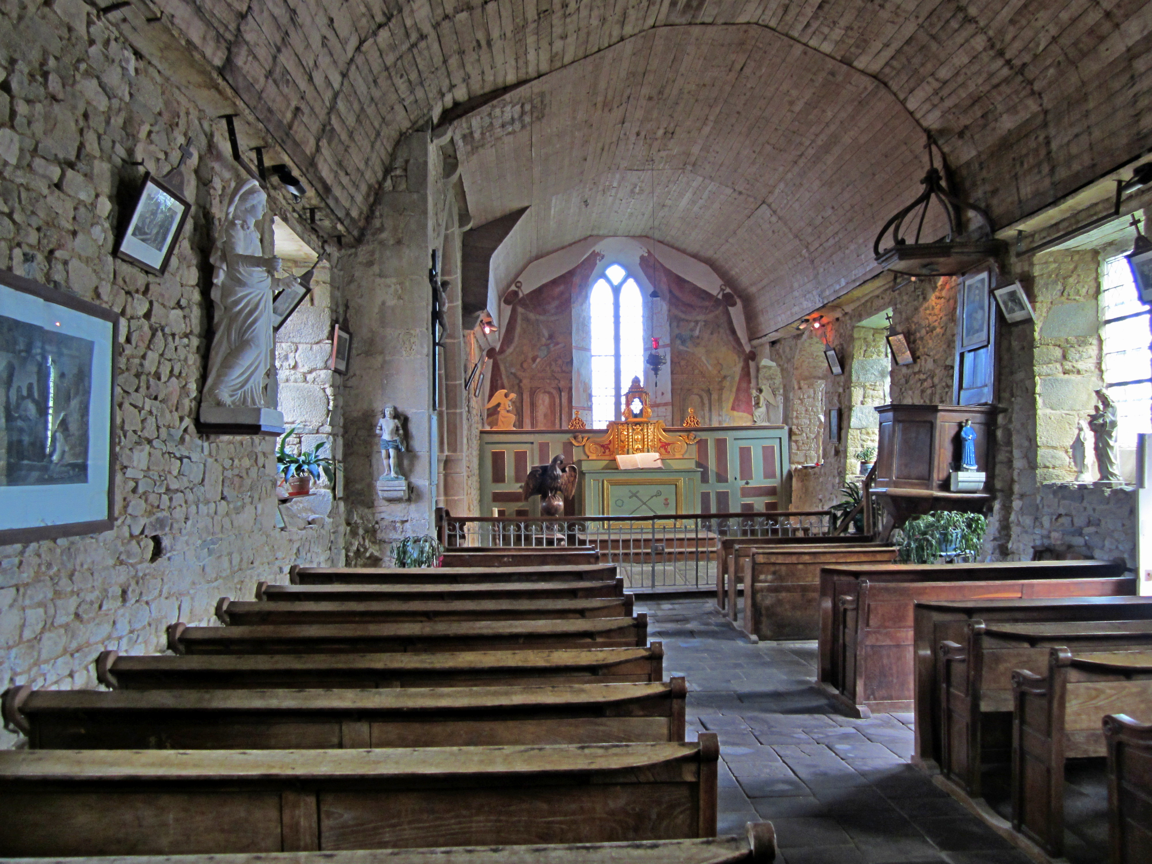 Sainte-Eugienne, Tirepied, Manche